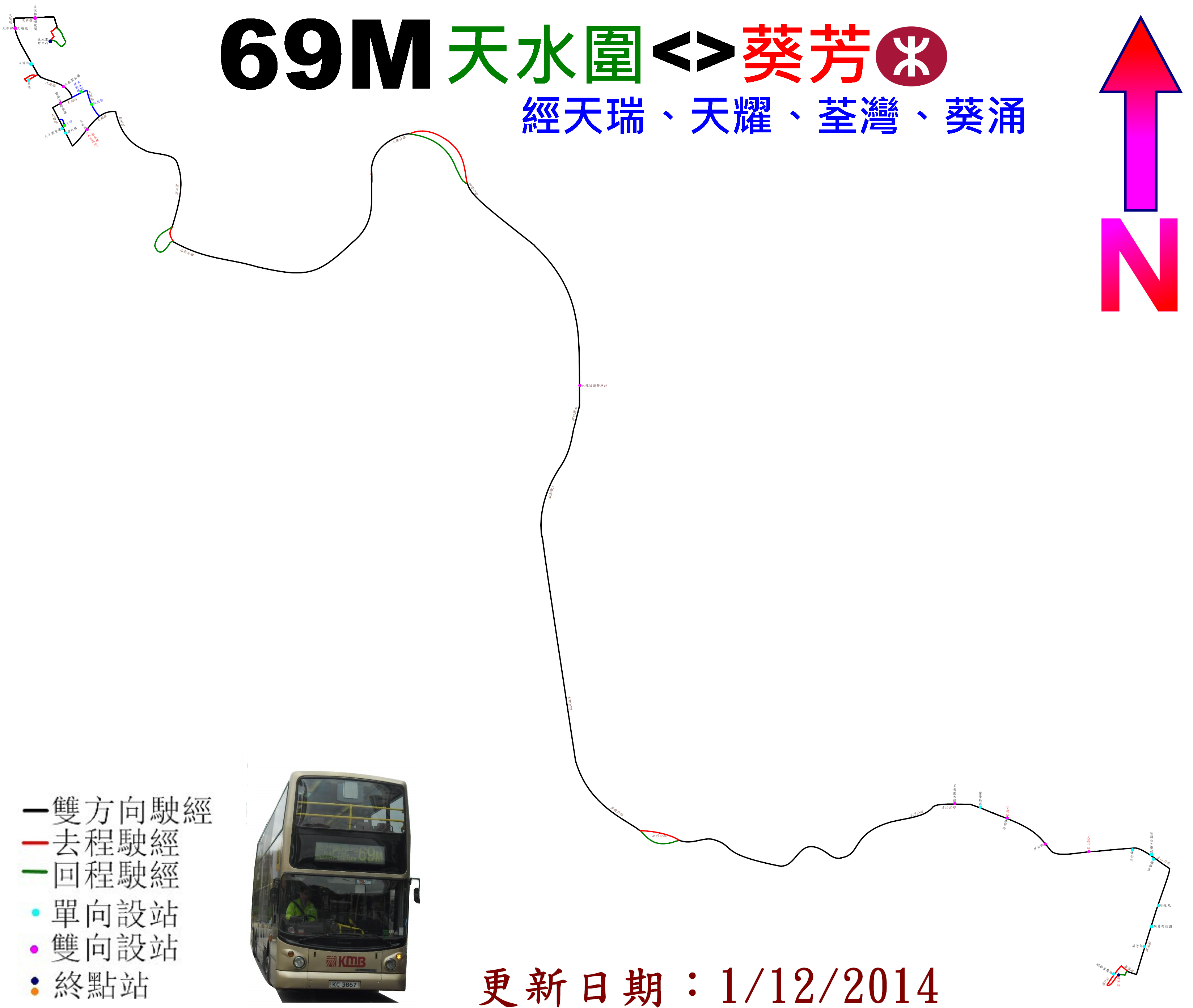 中文（香港）: 九巴69M線的走線圖